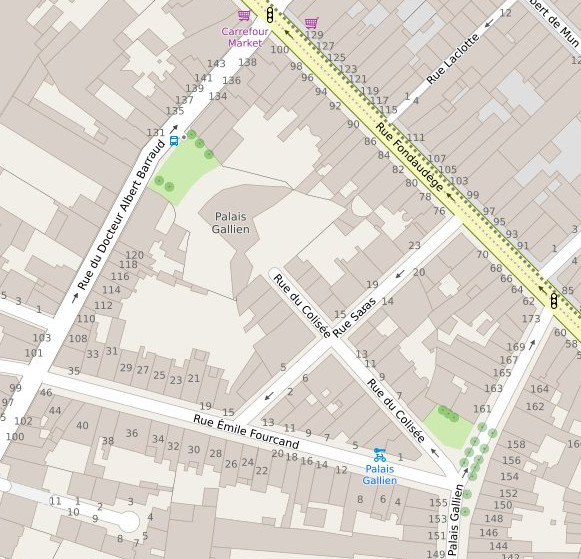 L'empreinte des arènes de Bordeaux, dites Palais Gallien, visible sur le cadastre. This map may be incomplete, and may contain errors. Don't rely solely on it for navigation.